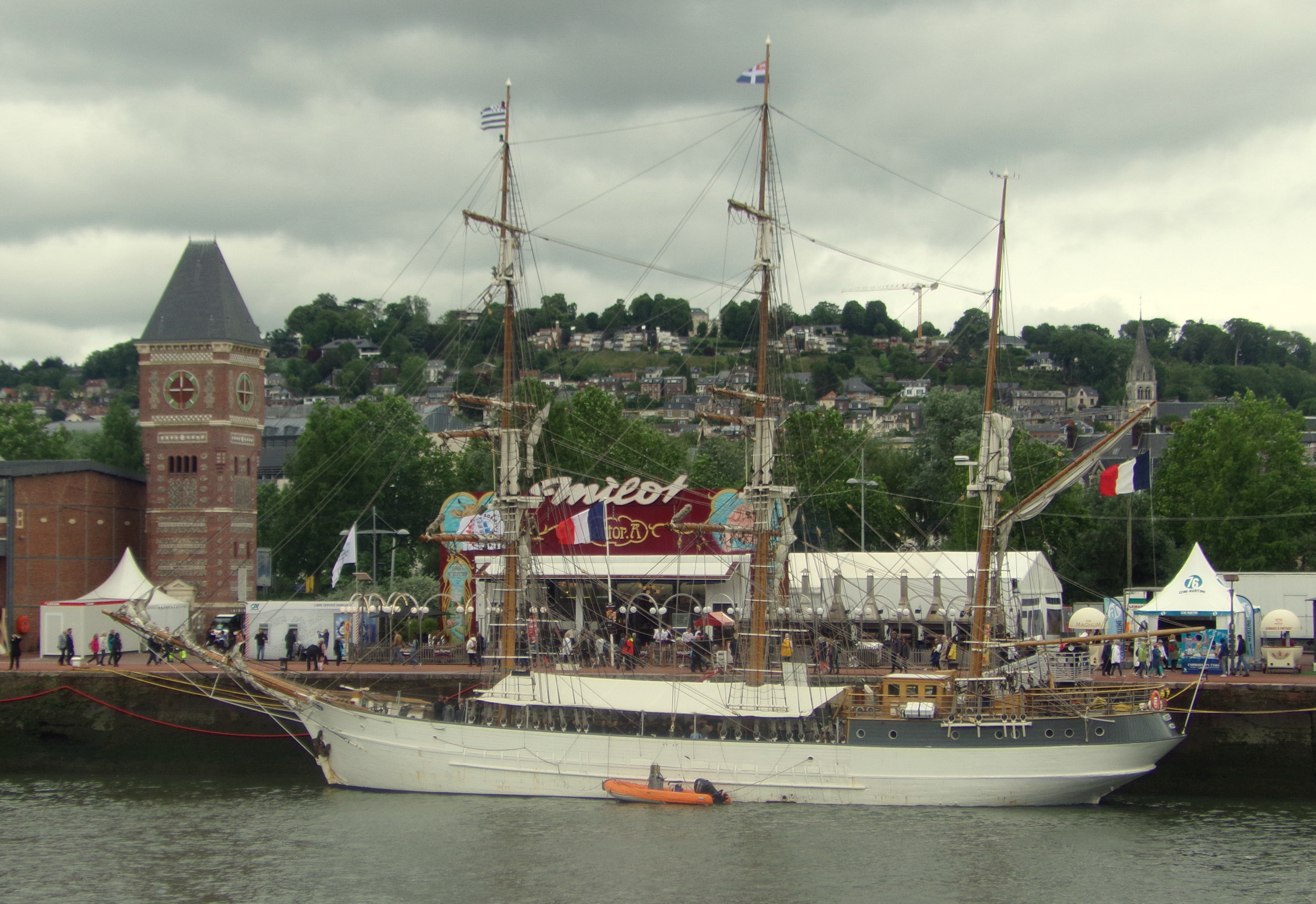 Le trois-mâts barque Le Français